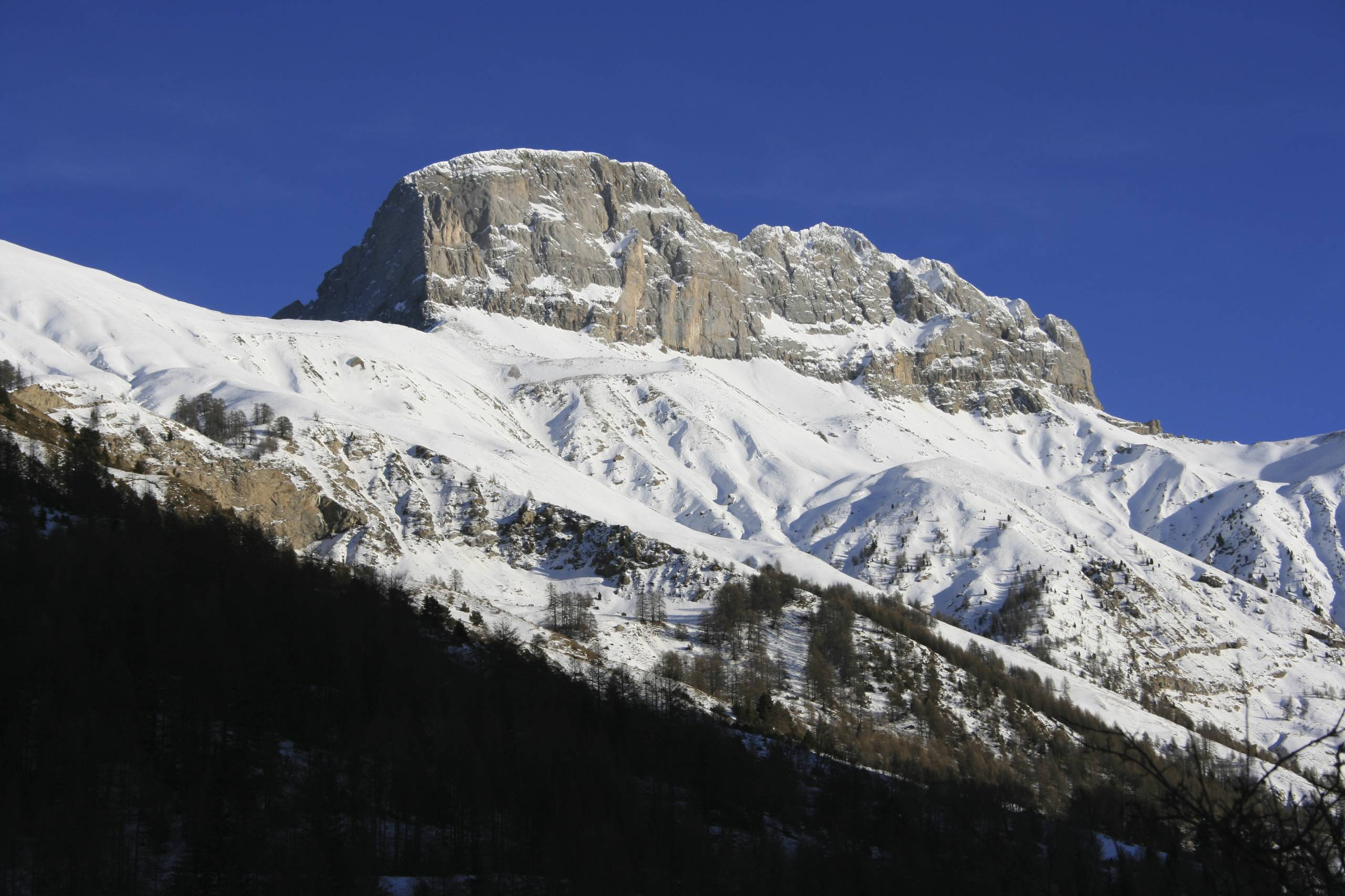 La grande Séolane, février 2008